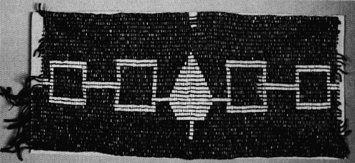 Een plaatje van "Hiawatha's Belt", de vlag van de Iroquois. Persoonlijke foto.